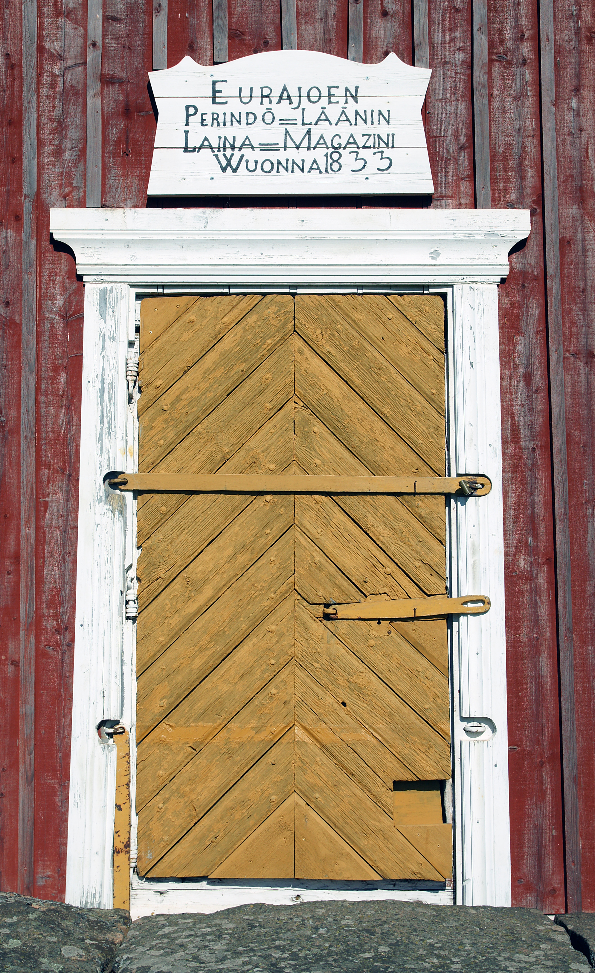 Irjanteen kirkon edustalla sijaitsevan vuodelta 1833 olevan ison lainamakasiinin ovi.